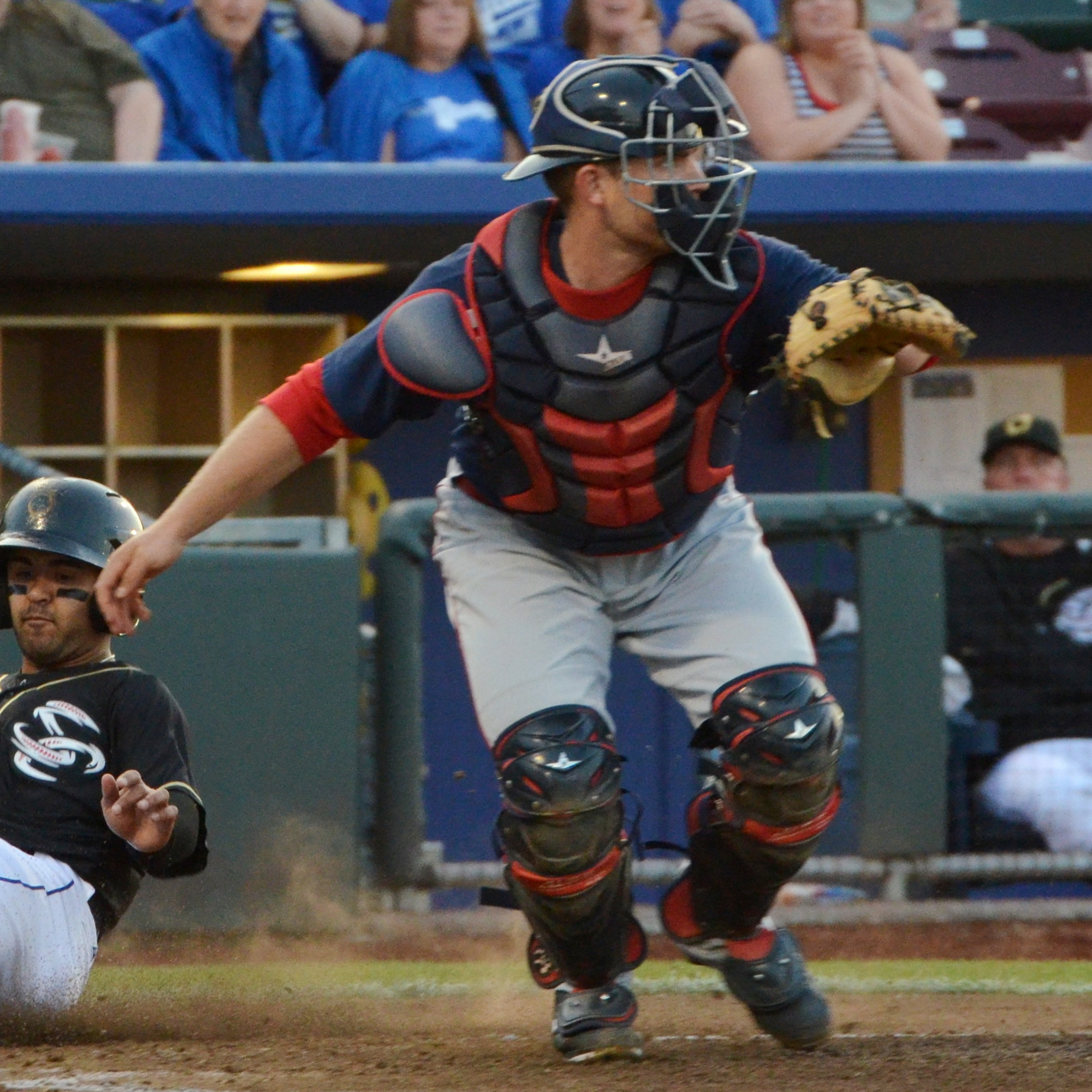 Max Stassi